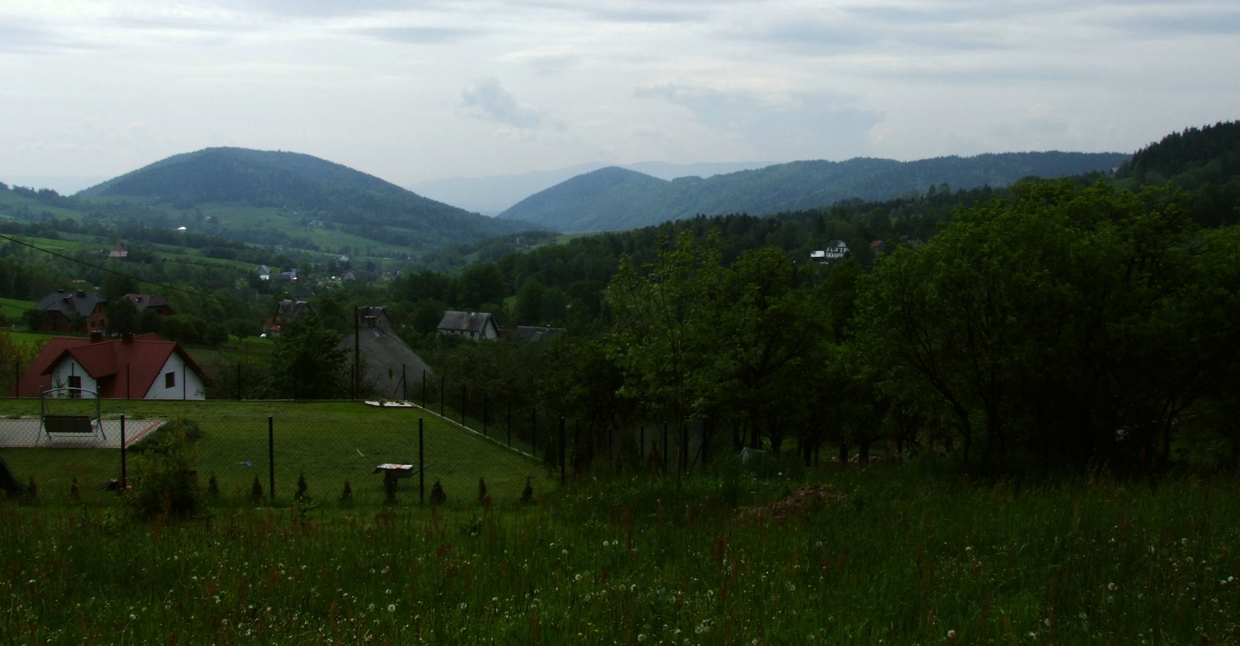 Widok z Roztoki. Po lewej stronie Pępówka, po prawej Skiełek i ciągnące się od niego pasmo Ostra-Cichoń. Pomiędzy Pępówką i Skiełkiem dolina potoku Łukowica i znajdująca się w niej miejscowość Łukowica